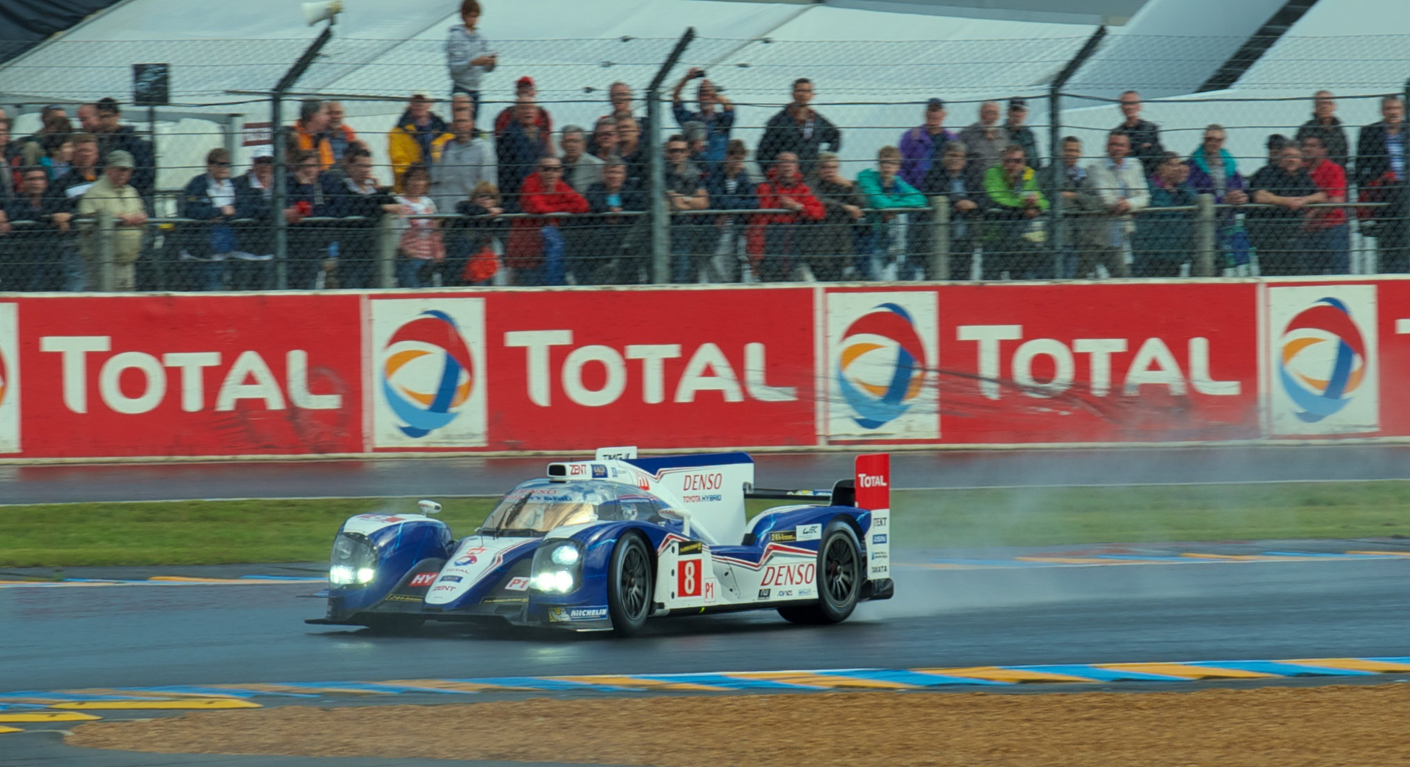 KAM_3951